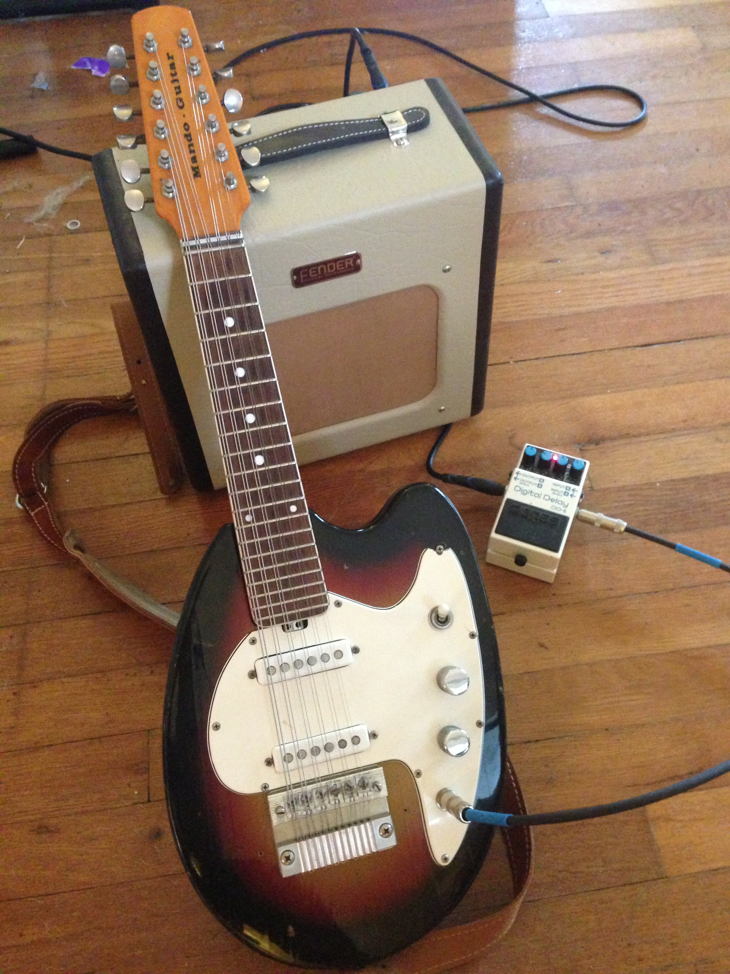 Circa... 1966? 1967?